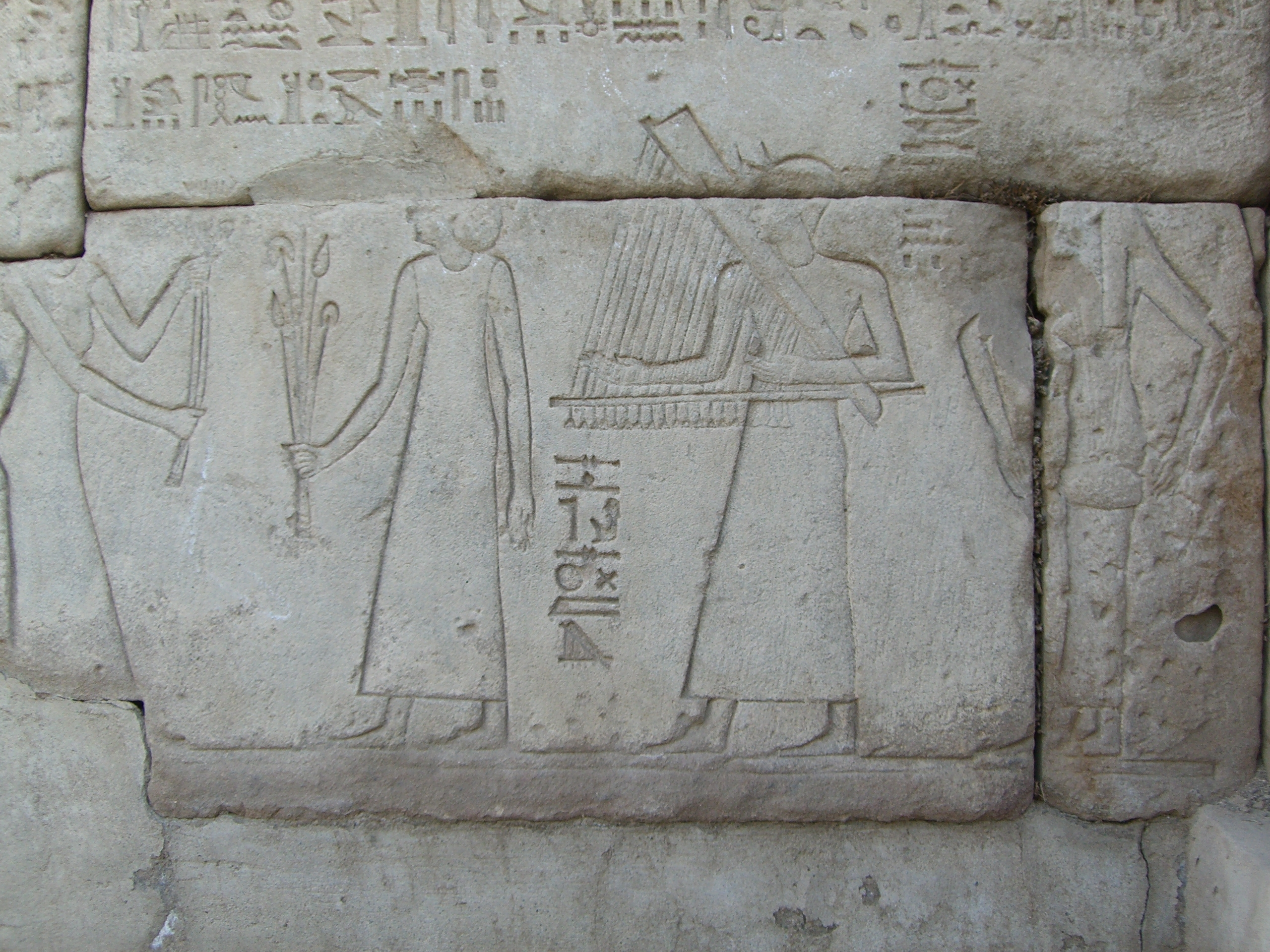 Relief du mur de Trajan et Domitien représentant une procession de chanteurs et musiciens en l'honneur du dieu Montou de Medamoud.